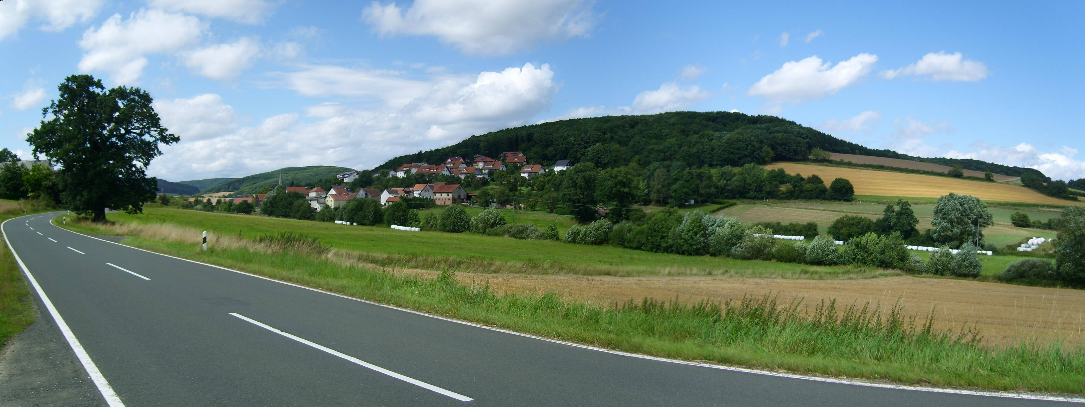 Blick vom Ortsausgang Richtung Nesselbrunn auf Weitershausen an den Hängen der Alten Kirch (374 m). Links im Hintergrund die Hardt (396 m), links davon entfernter der Kronenberg (456 m). Links im Vordergrund eine alte Eiche (Naturdenkmal), die größtenteils den ebenfalls 456 m hohen Streichenberg verdeckt - alles Damshäuser Kuppen